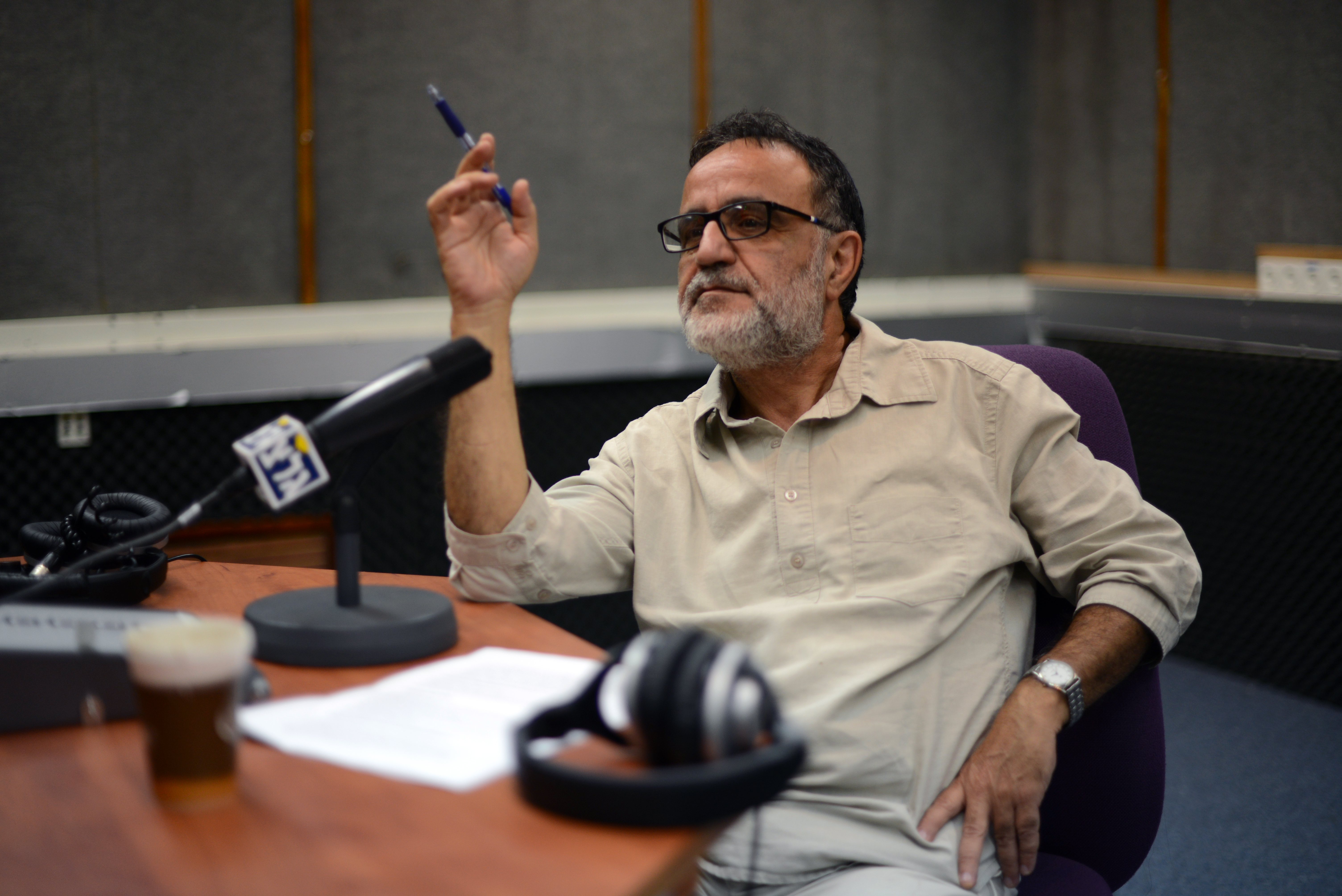 בגלי צהל משדר את התוכנית השבועית "זה המקום עם אהוד בנאי"